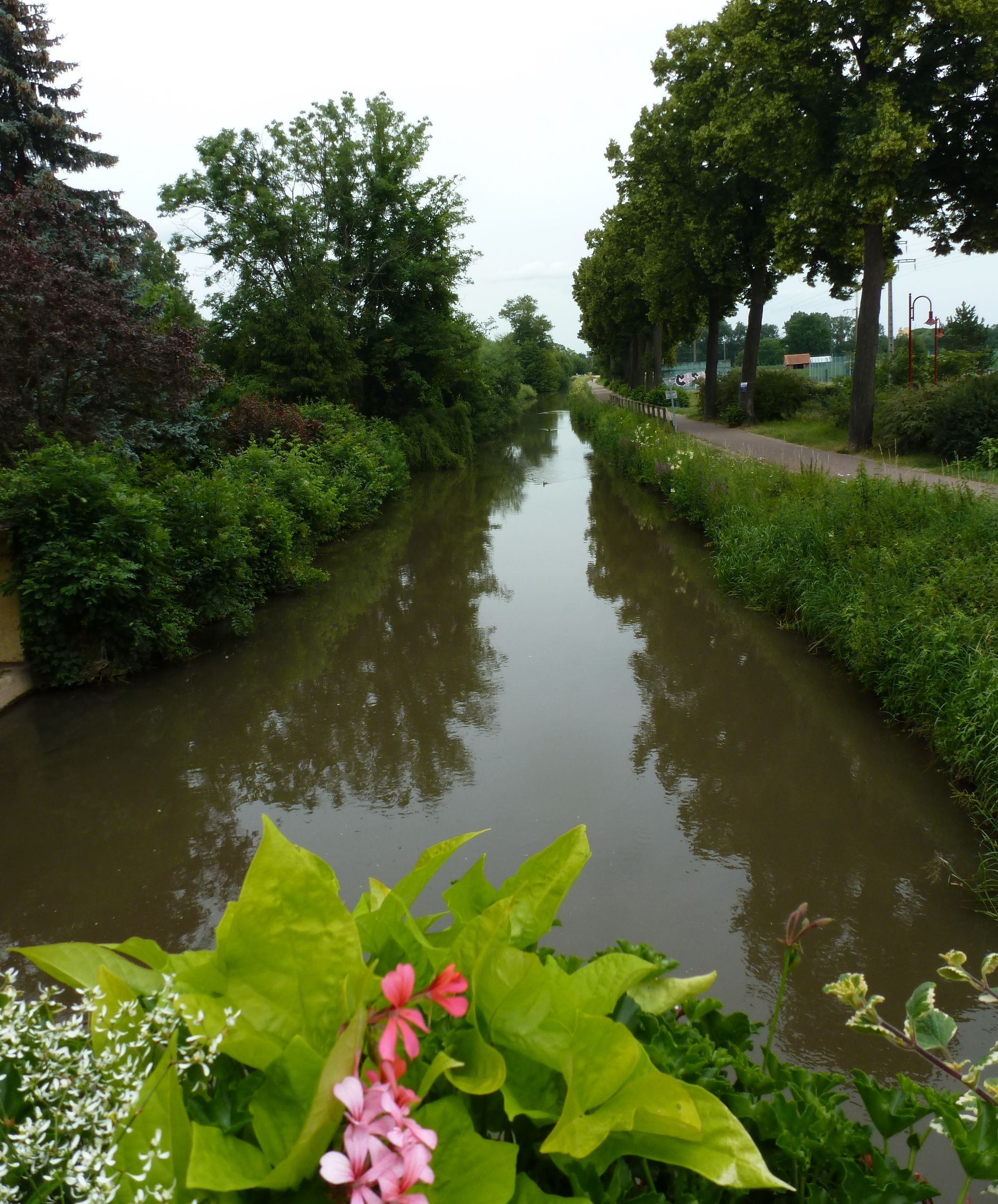 Blick auf den Canal de la Bruche (Breuschkanal) in Richtung Osten. Rechts befindet sich der 21 km lange Radweg (piste cyclable), der Straßburg und Molsheim verbindet.